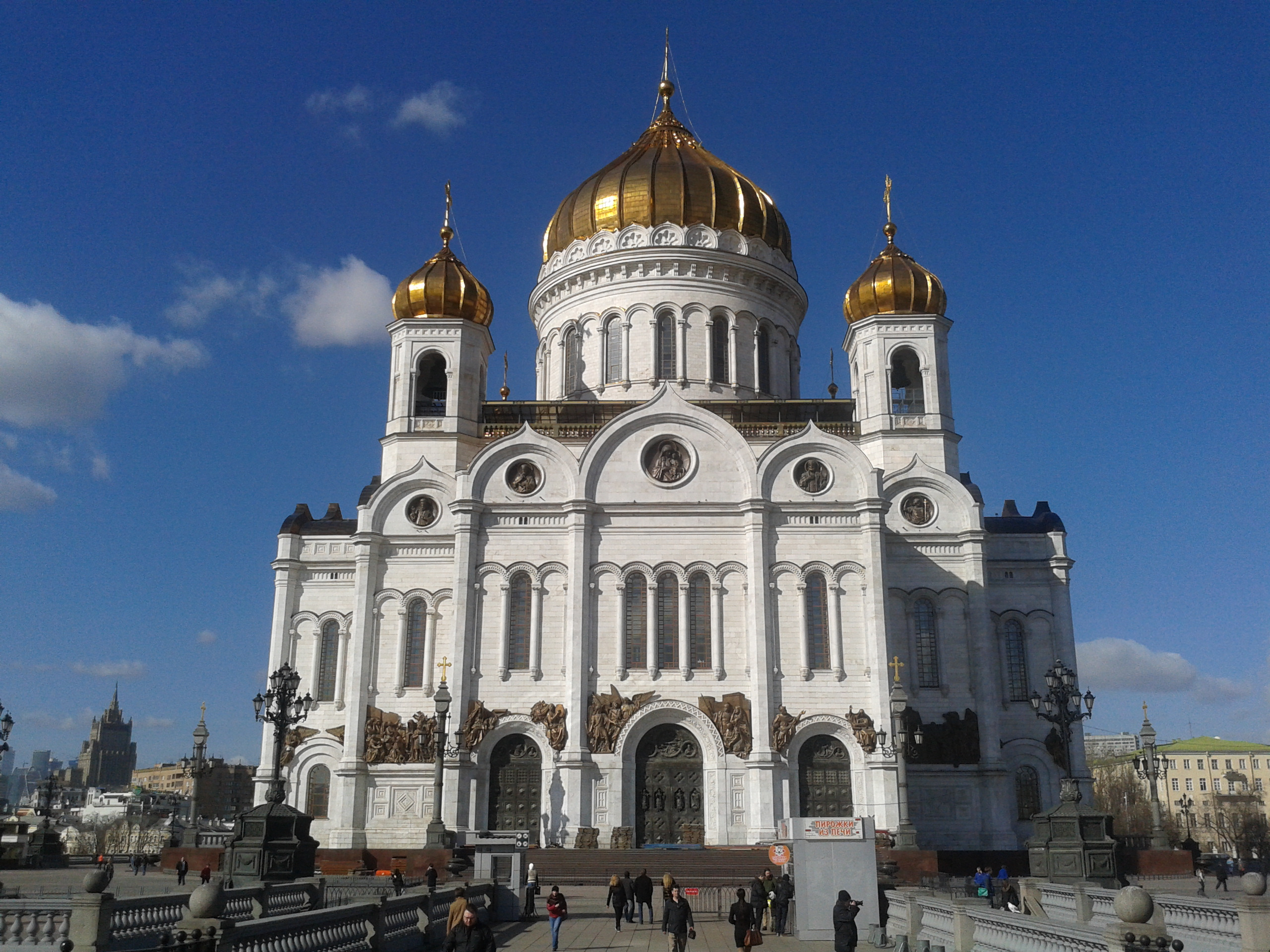 Храм Христа Спасителя, Москва. Вид с моста патриарха Алексия II